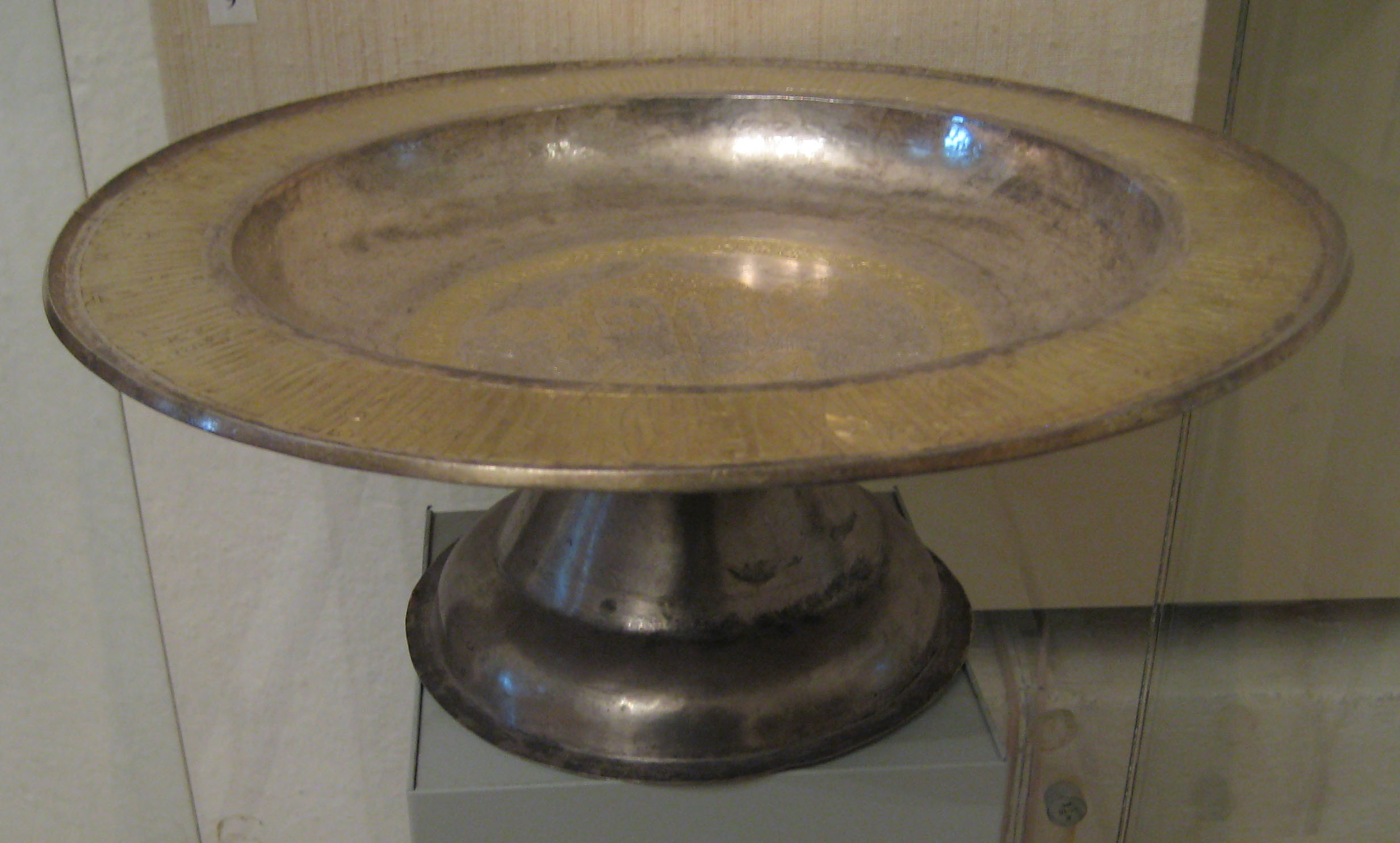 Silver Paten. Дискос. XVI c. Silver